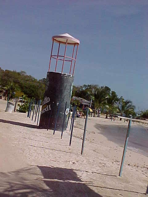 Los Totumos en el estado Miranda - Venezuela (2000)